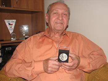 Tohle je můj skvělý dědeček.Fotografii jsem vložil, protože má stránku s jeho sportovními úspěchy na wikipedii a nebyla tam jeho fotka.Prosím o její doplnění na danou stránku.